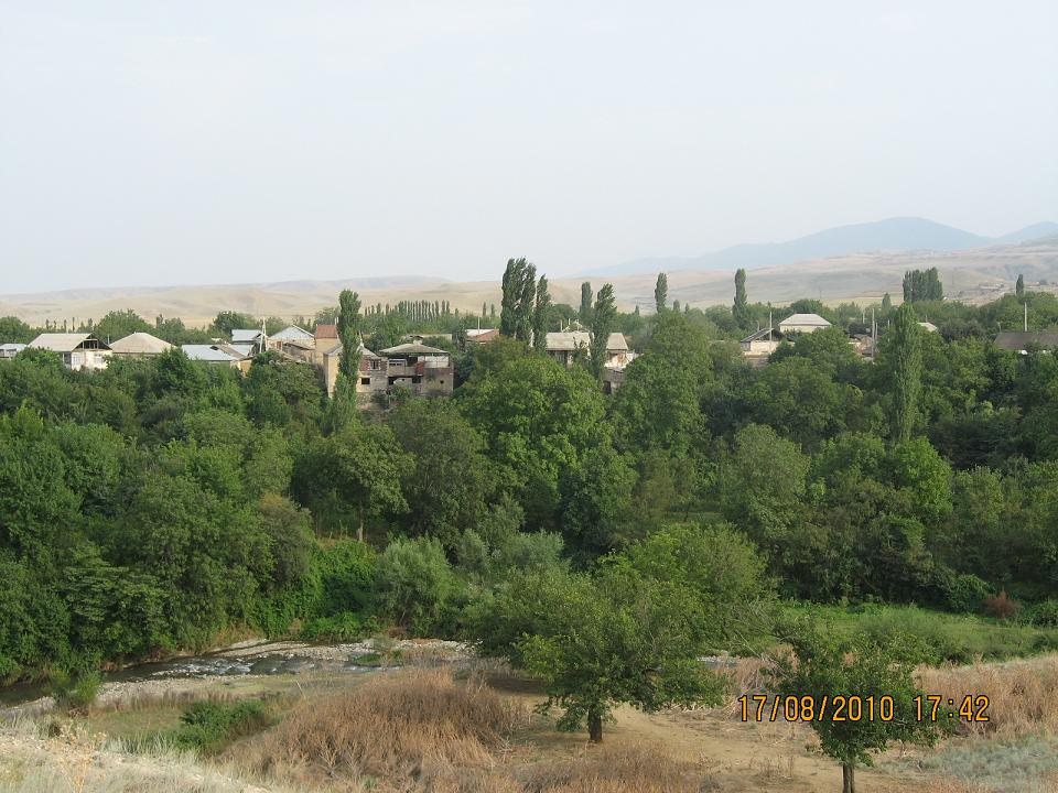 Goranboy, Shafaq kendi